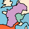 karta; egen produktion